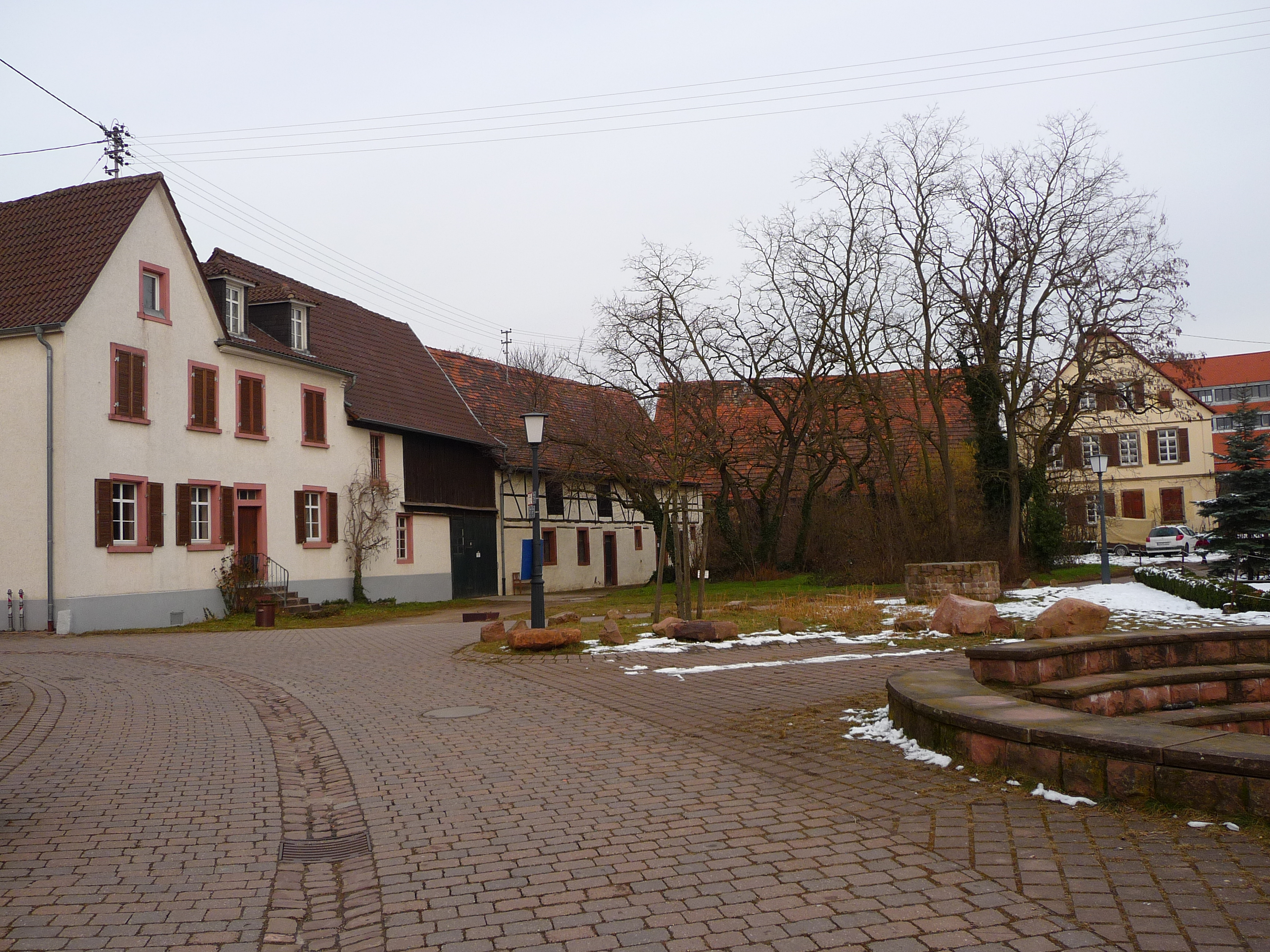 Pleikartsförsterhof in Heidelberg (Deutschland)